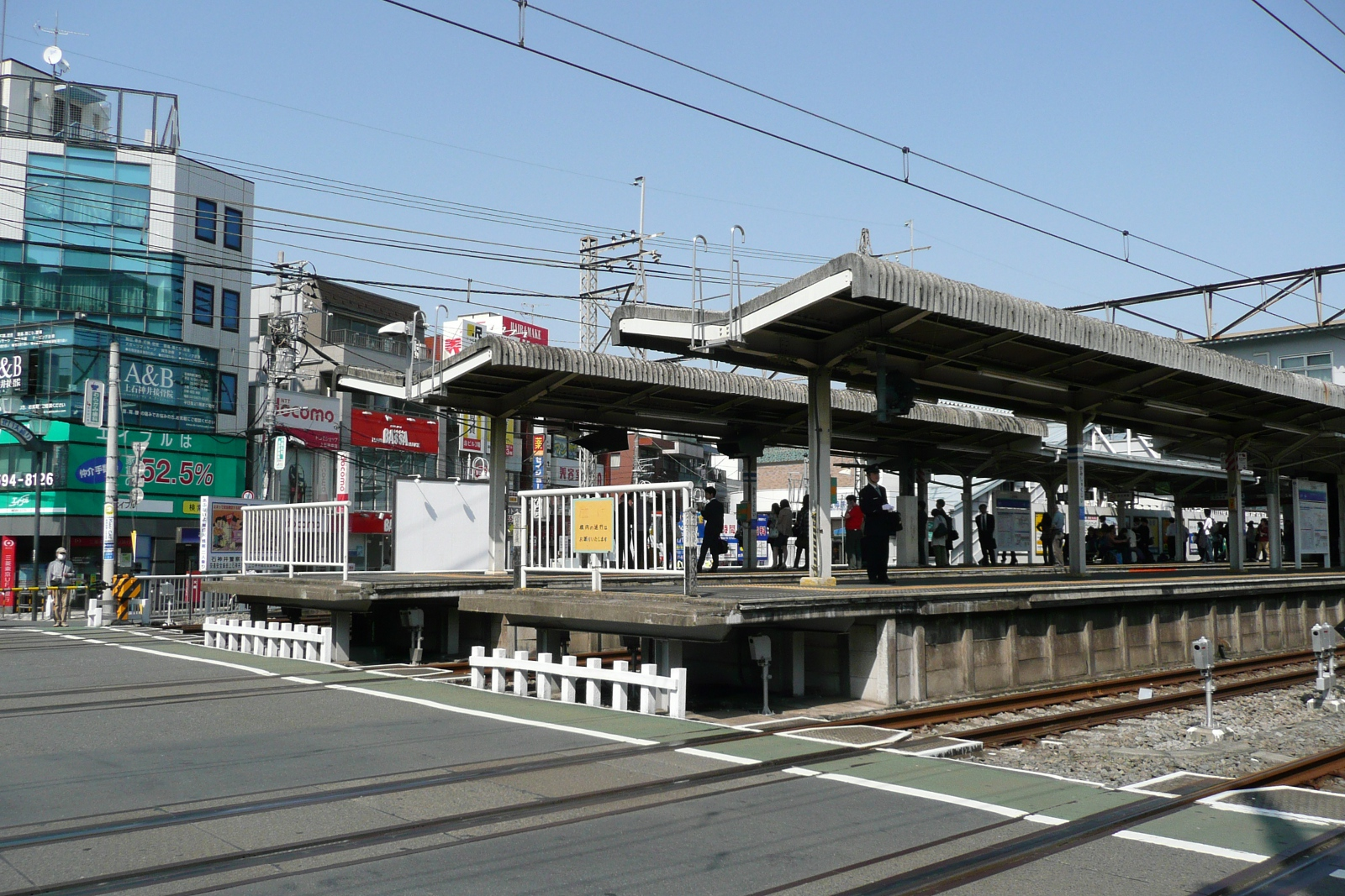 上石神井駅（隣接する踏切から）